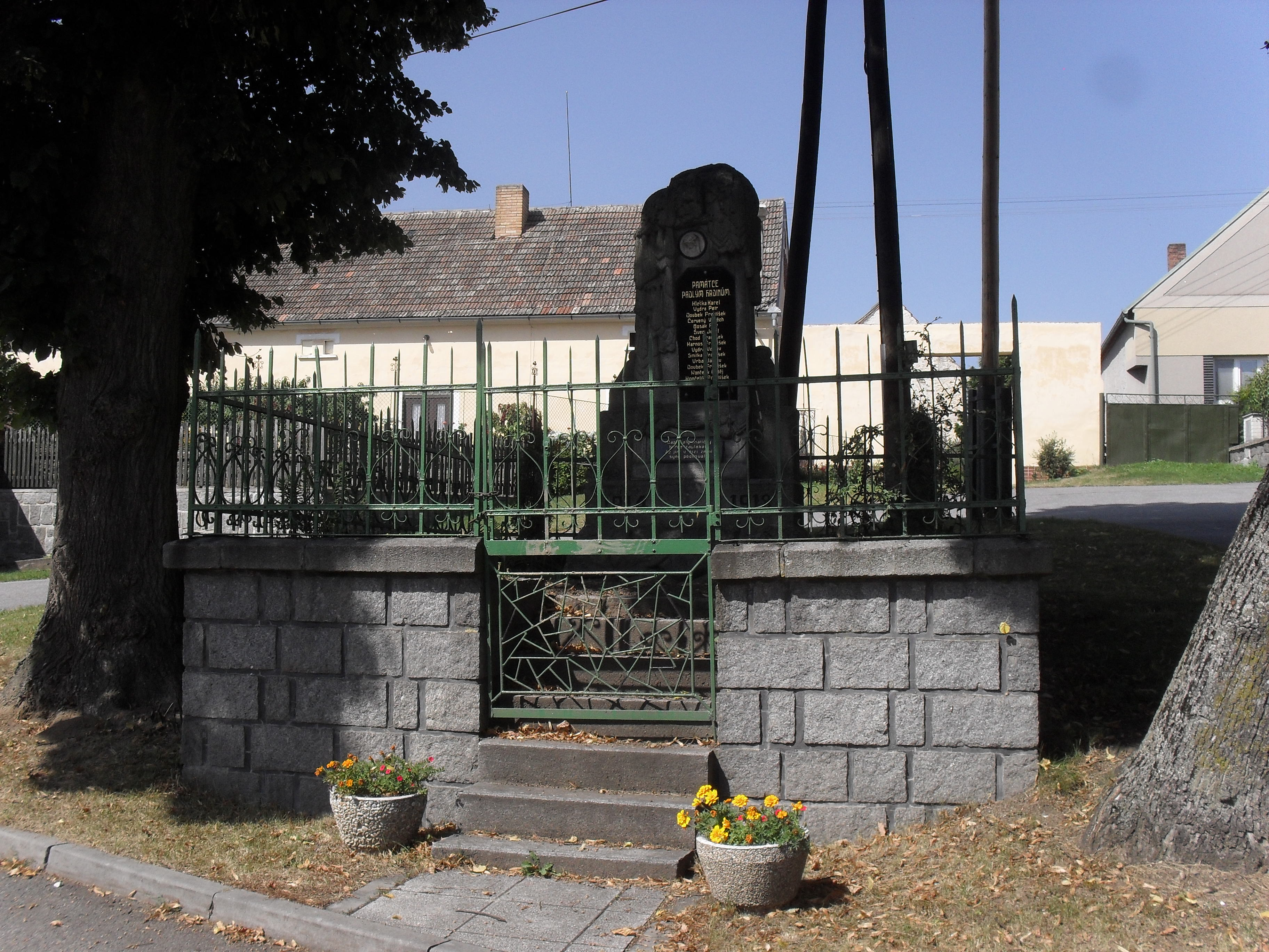 Fotografie pořízena v obci Čečelovice.